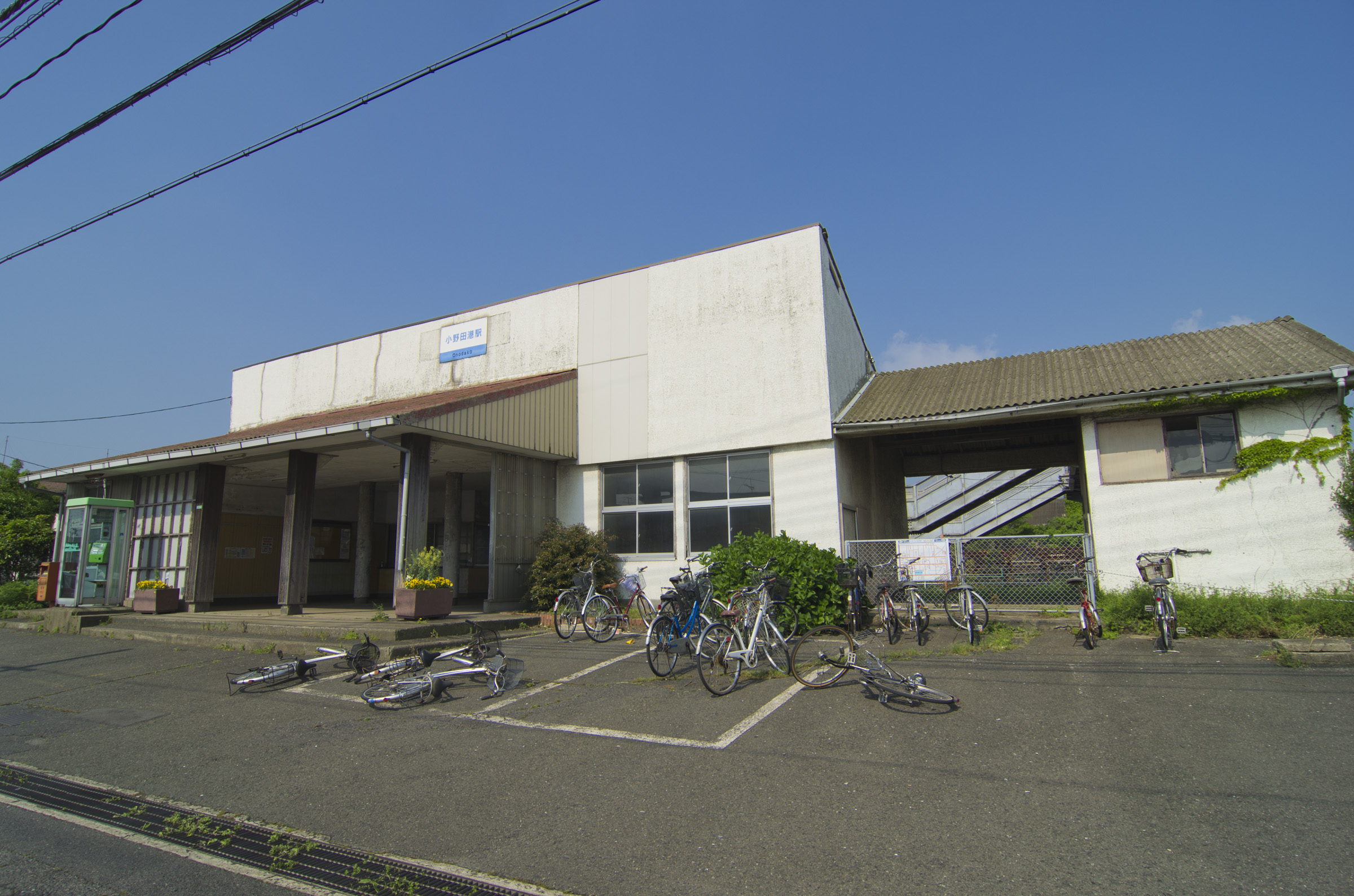 西日本旅客鉄道株式会社小野田線宇部港駅